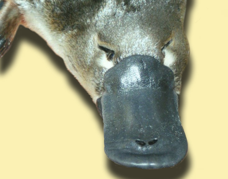 l'Ornythorynque chasse des écrevisses, mais il est en grande partie filtreur ; grâce aux plaques cornées de sa bouche en forme de bec élargi, il filtre et ingère les petits, escargots d'eau, crustacés ou vers et larves (principalement larves de trichoptères (Trichoptera) qui en Tasmanie constituent 64 % de son alimentation estiavale (41 % en hiver) en Tasmanie(source : Article de l'encyclopédie Larousse ornithorynque , consultée 2012-06-14)